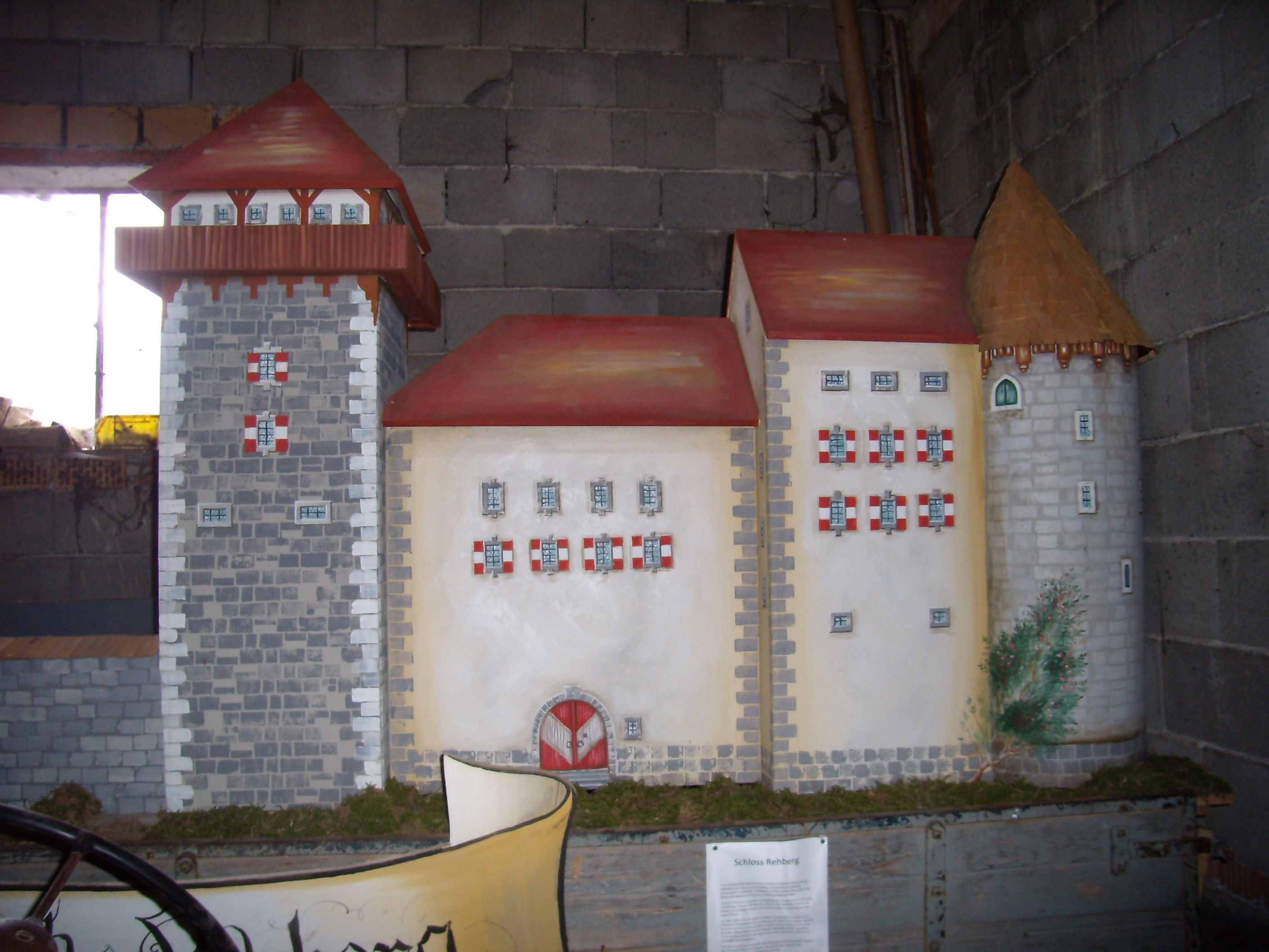 Rührndorf Nr. 42 - MOdell von Burg Rechberg